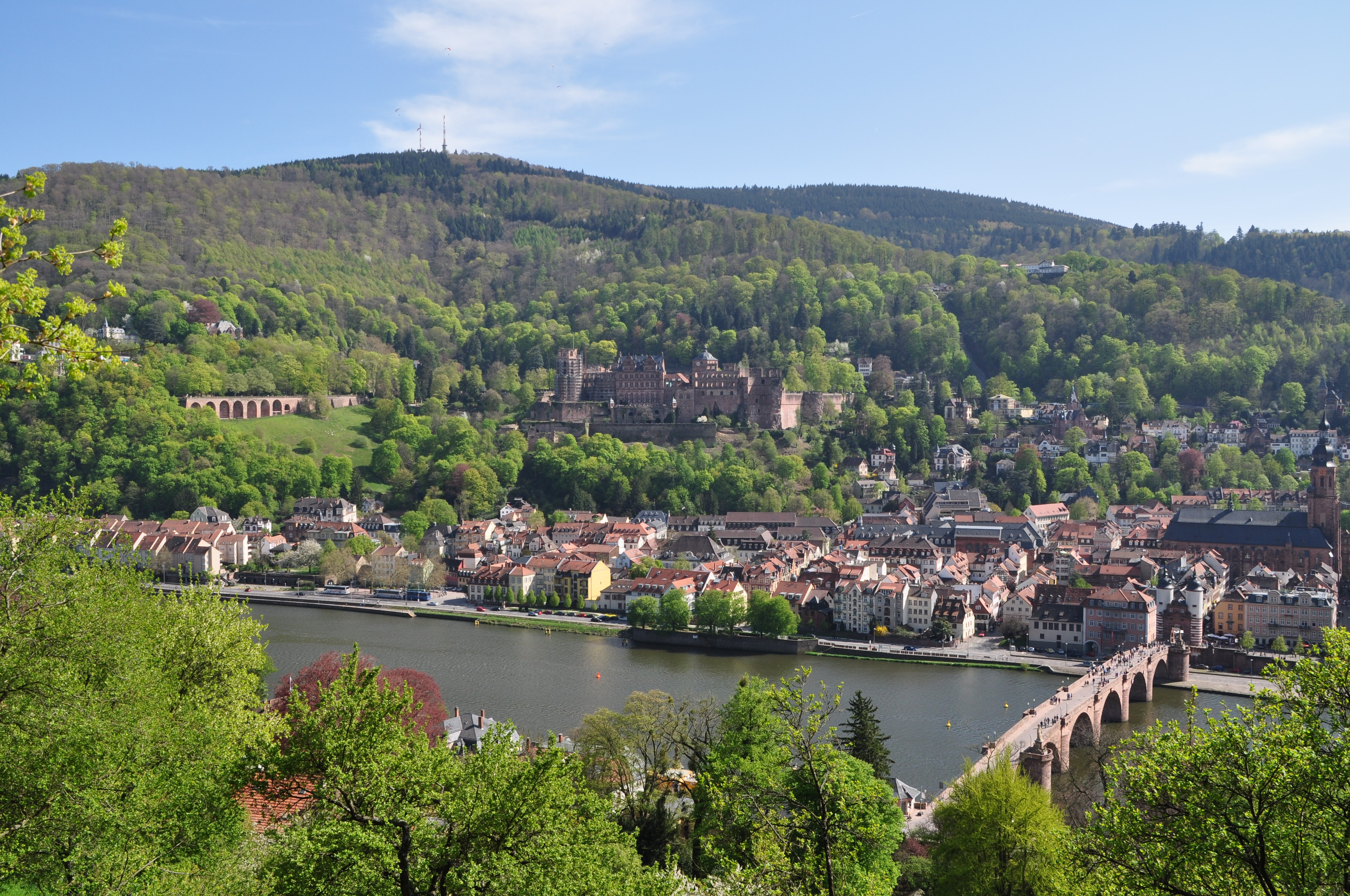 Heidelberg Schloss vom Schlangenweg